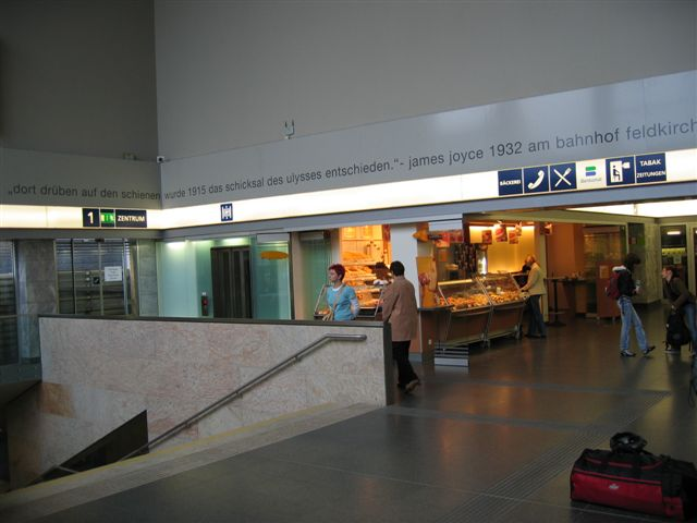 Im Rahmen des Umbaus des Bahnhofes Feldkirch haben die ÖBB die vom "Kulturkreis Feldkirch" am Bloomsday 1994 über den Fahrkartenschaltern montierte Gedenktafel im Jahr 2001 durch eine besonders anschauliche Präsentation des literarhistorischen "James Joyce"-Zitates in der Feldkircher Bahnhofshalle ersetzt, womit die ÖBB wesentlich zur Verbreitung des Zitates beitragen.